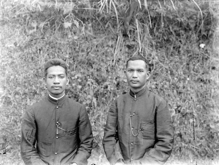 Negatief. Res. Tapanoeli. Bataksche Christen onderwijzers.